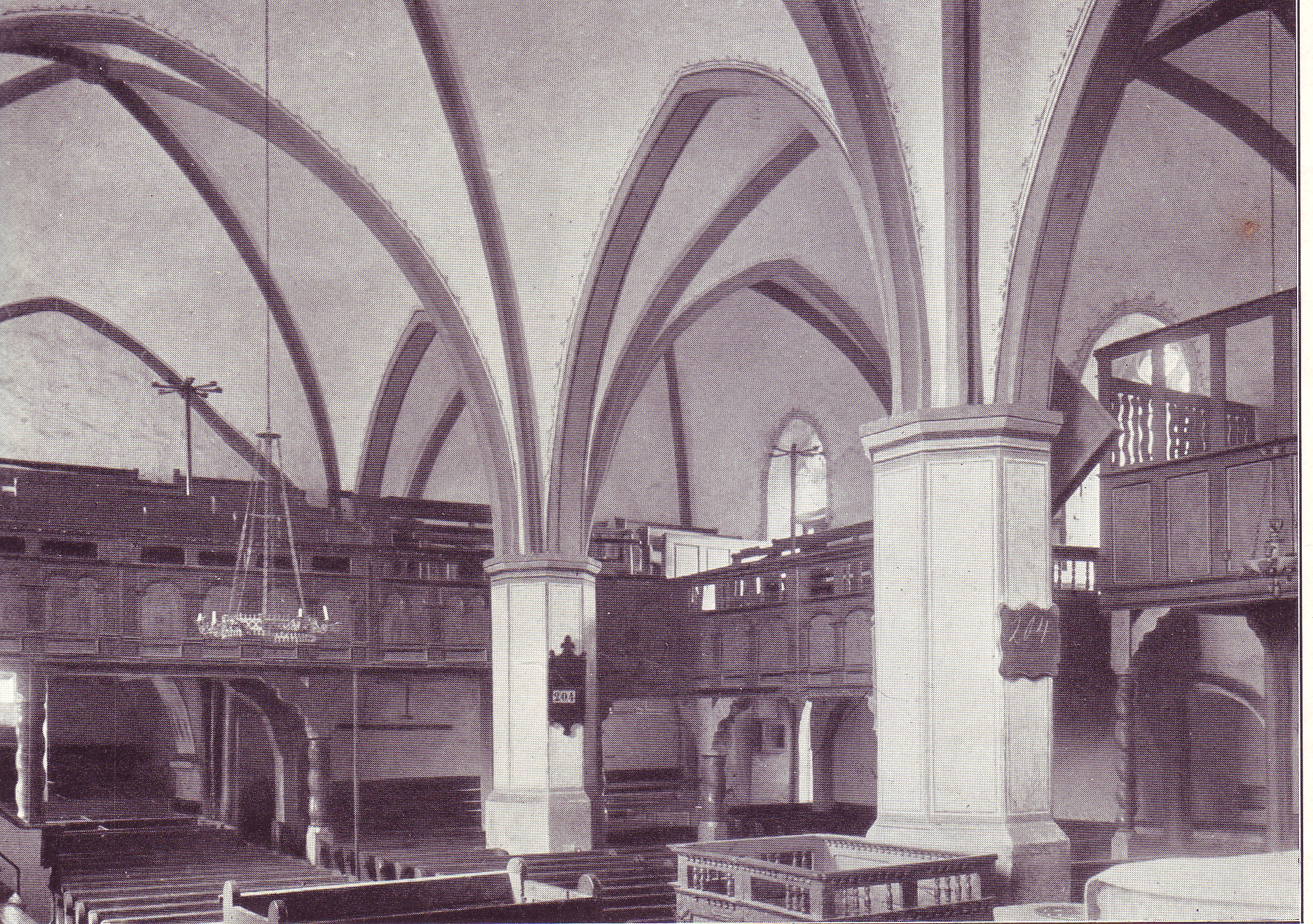 St. Marien (Lübbecke-Blasheim)